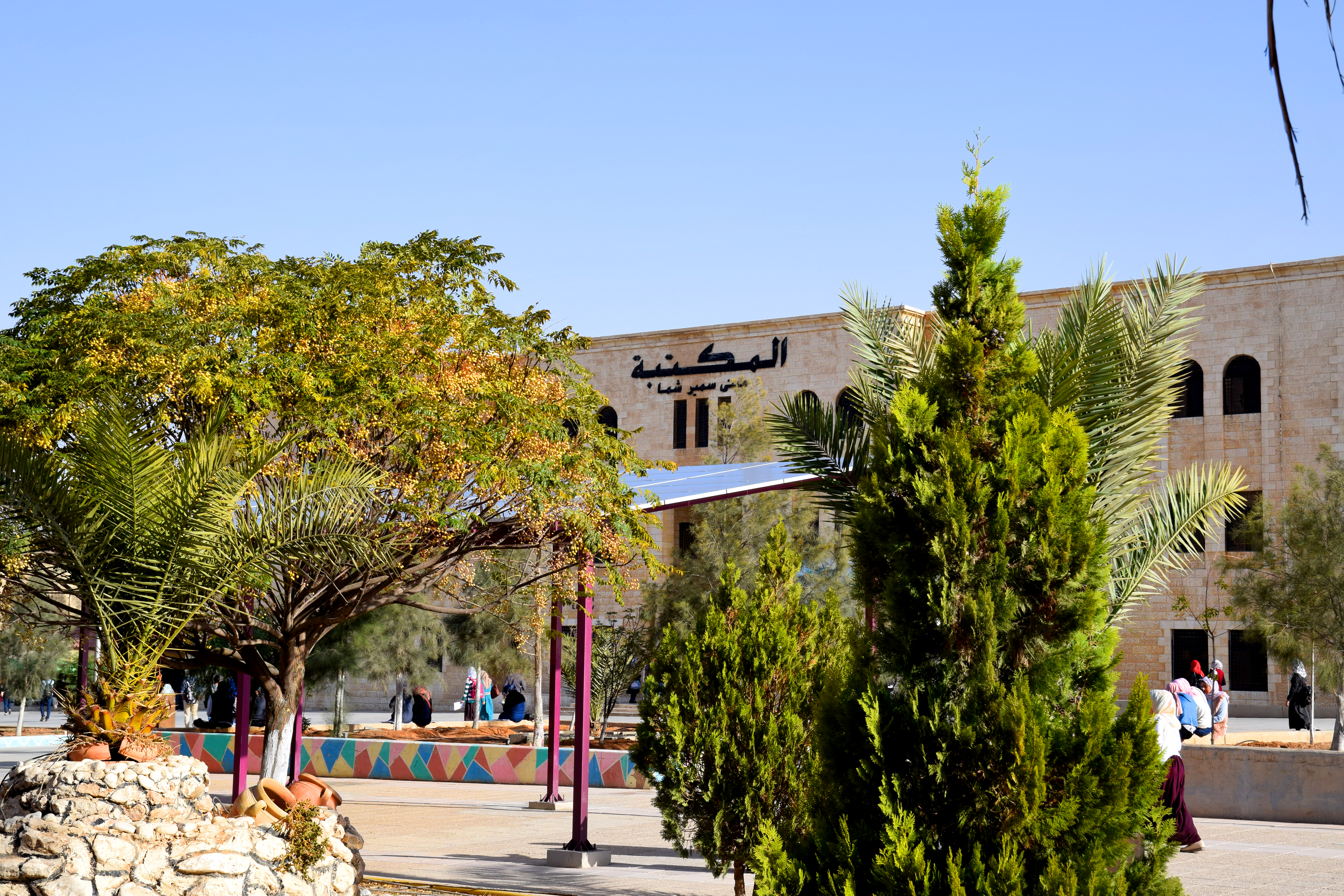 الهاشمية